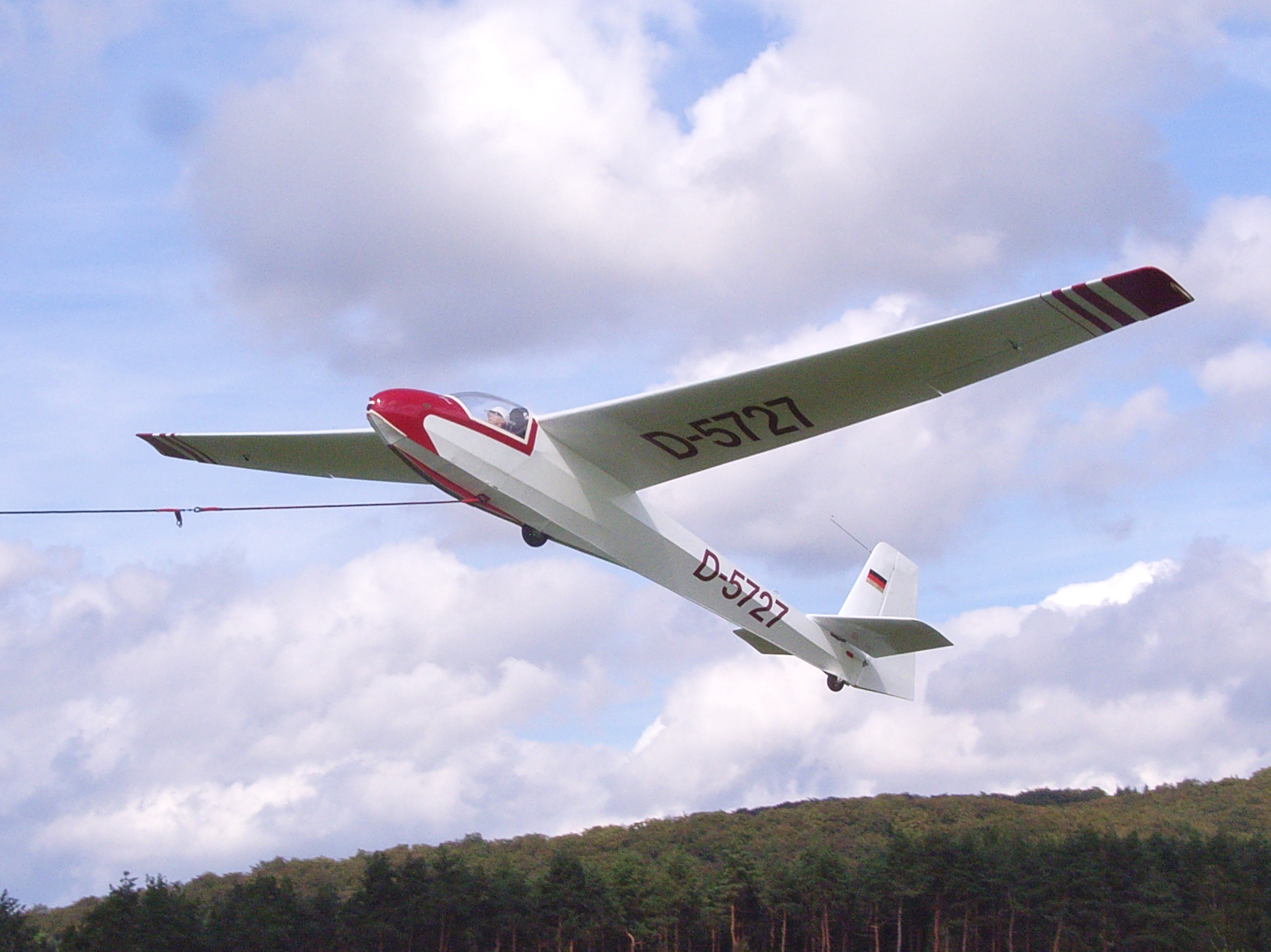 Bewegliches Kulturgut der Stadt Herford. Stationiert auf dem Flugplatz Oerlinghausen.